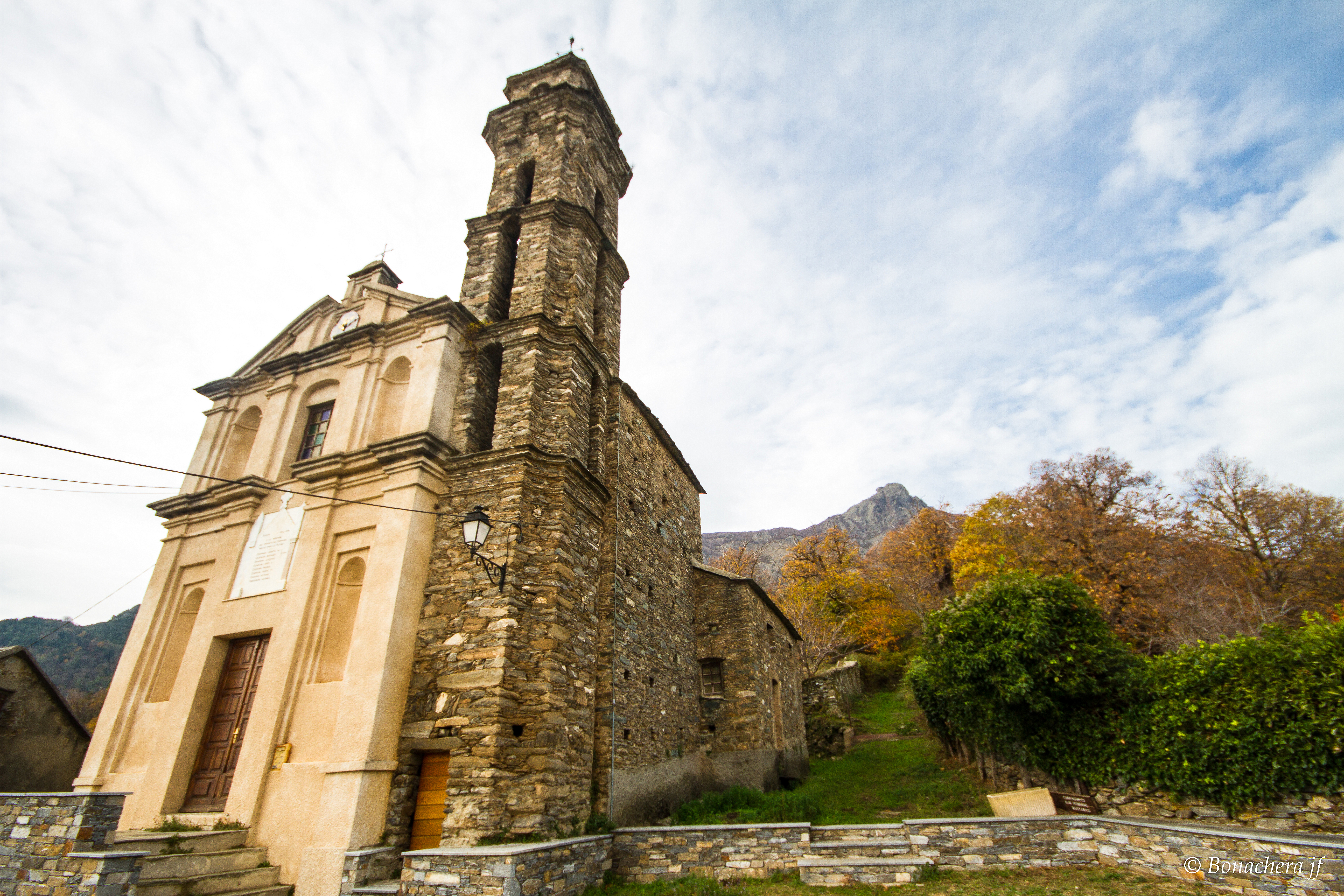 L'église Sant'Andrea de Camnpana (Corse)